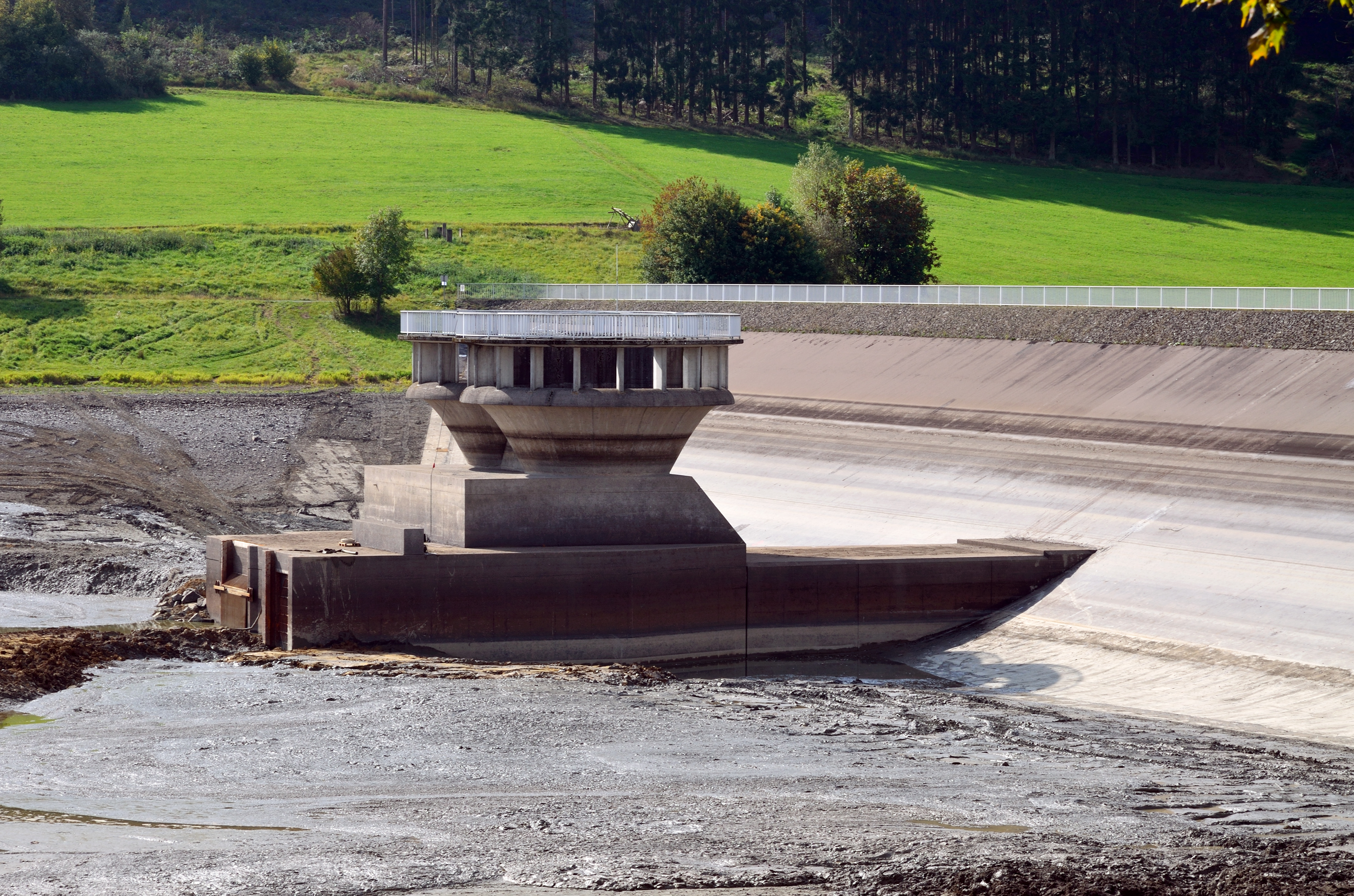 Der Aartalsee (Hauptbecken) bei abgelassenem Wasser